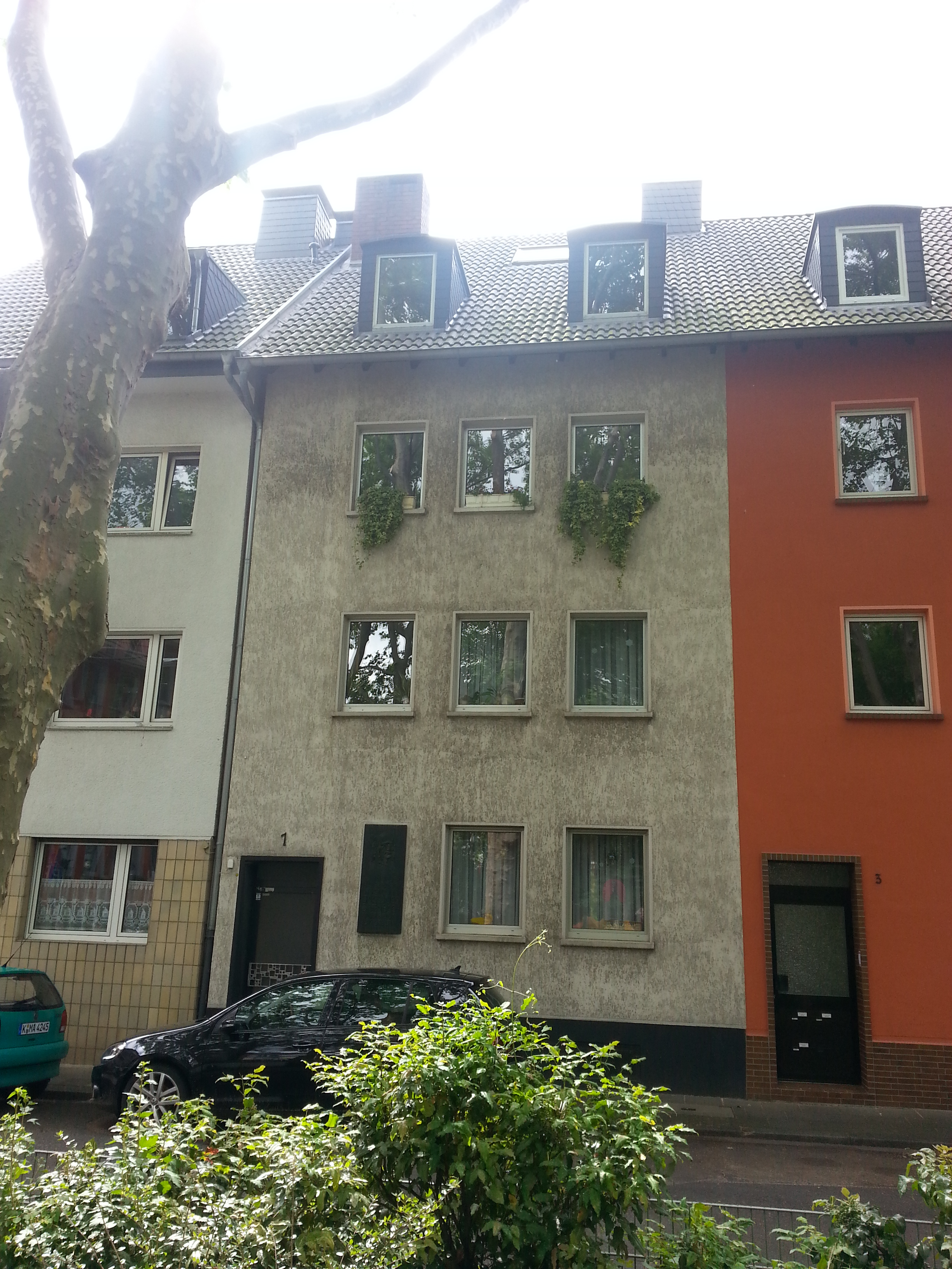 Offenbach´s Geburtshaus Großer Griechenmarkt 1, 50676 Köln